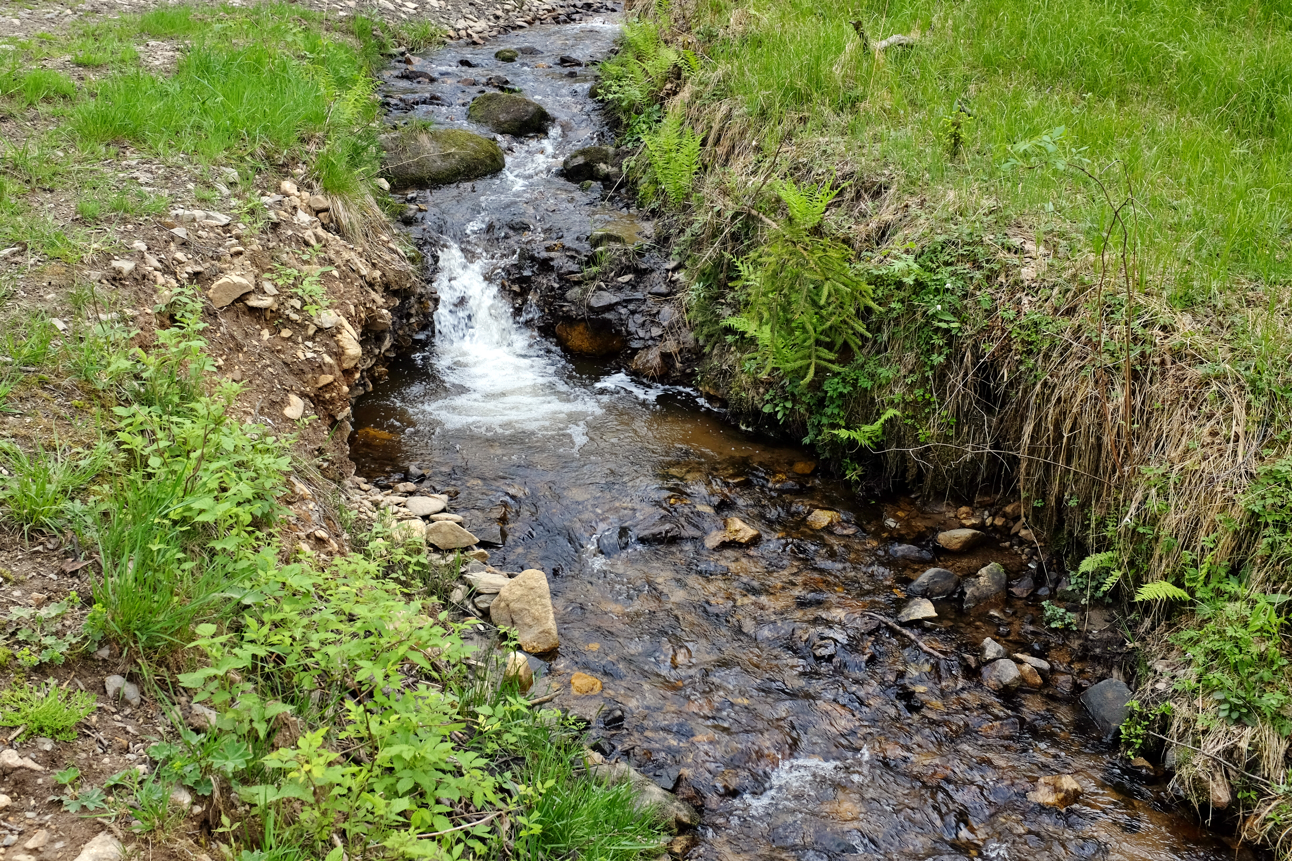 Potok Rabůvka, přítok Velké Libavy ve Slavkovském lese, okres Sokolov